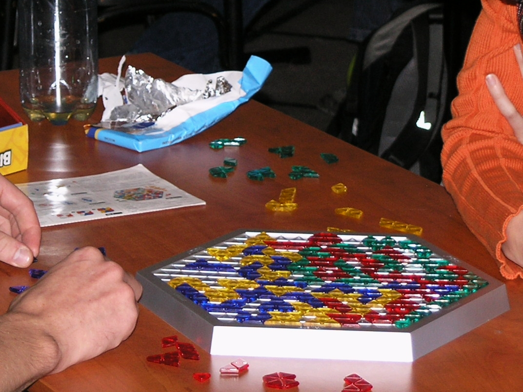 Deskohraní 2008